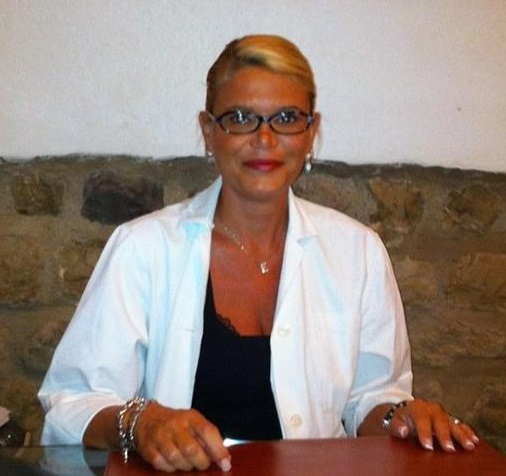 Eleonora Cantamessa, medico ginecologo investita da un'auto mentre soccorreva dei feriti.